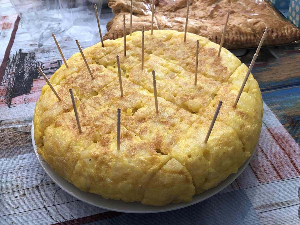 Tortiella de pataques